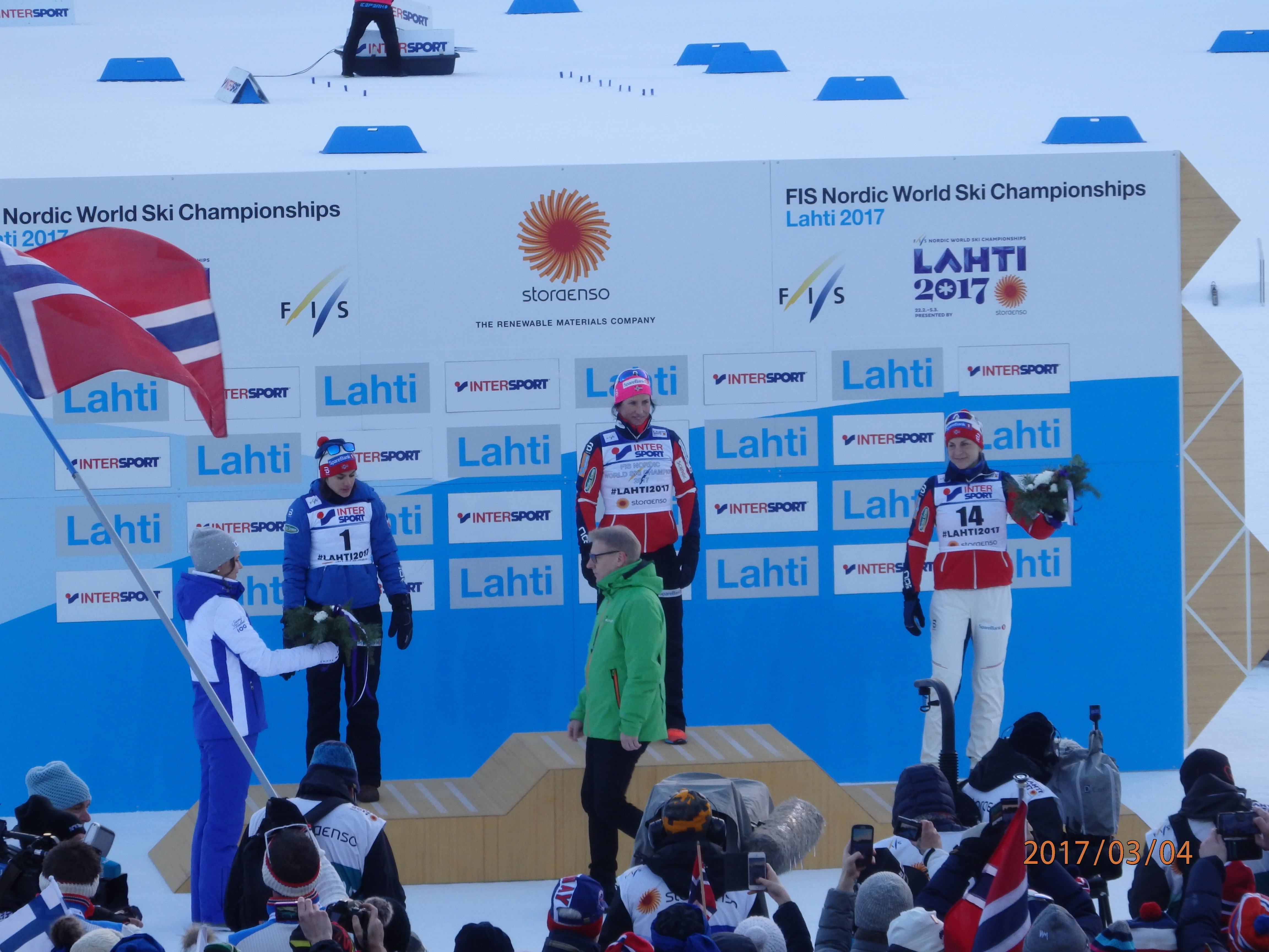 Seierspallen etter 30km kvinner VM i Lahti 2017. Marit, Heidi og Astrid